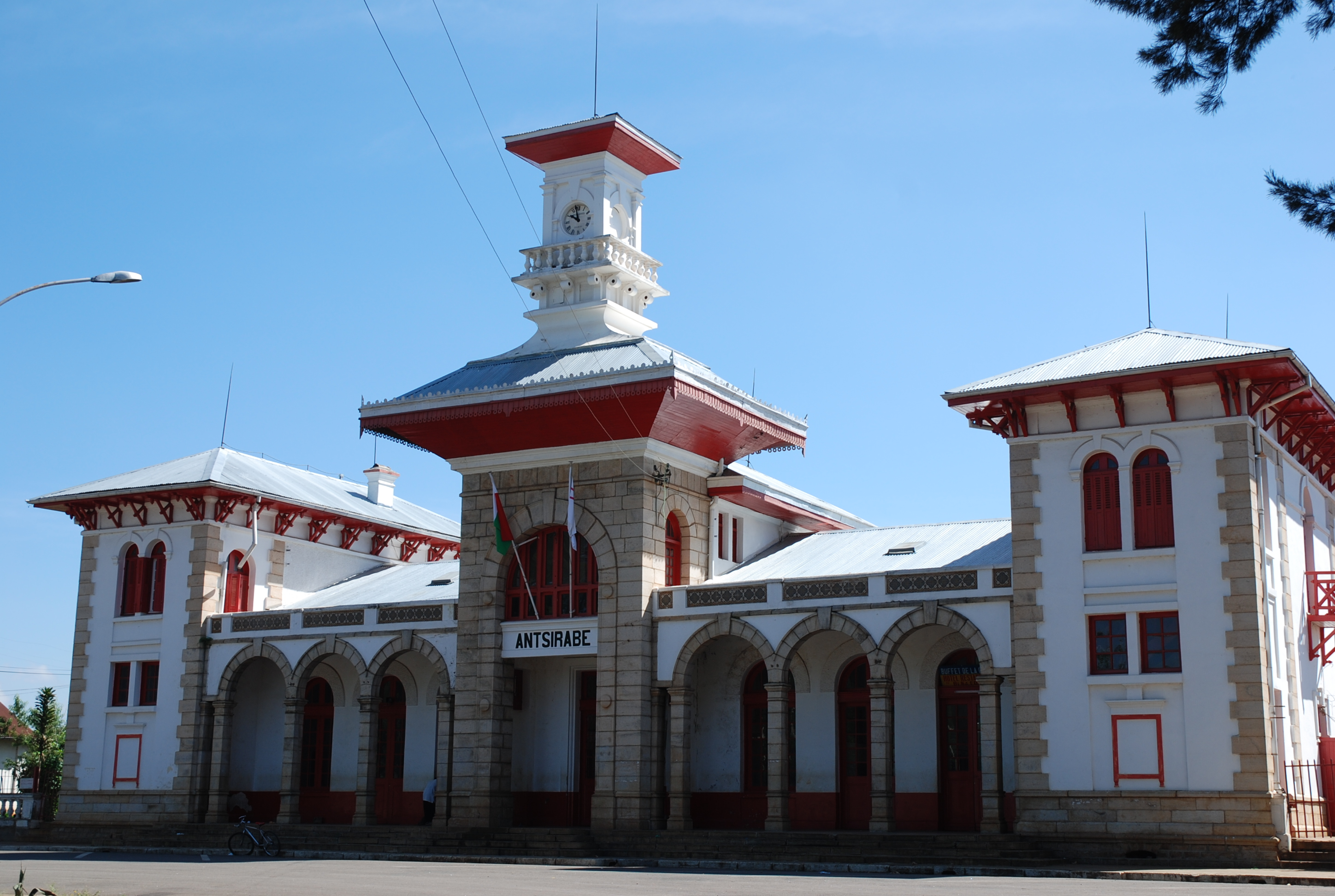 Bahnhof von Antsirabe